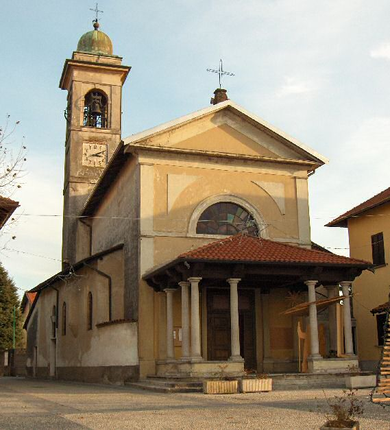 The Saint Eugenio Church in Tornavento (Lombardia, Italy) L'autore Franco Maria Boschetto ha rilasciato questa foto nel pubblico dominio.